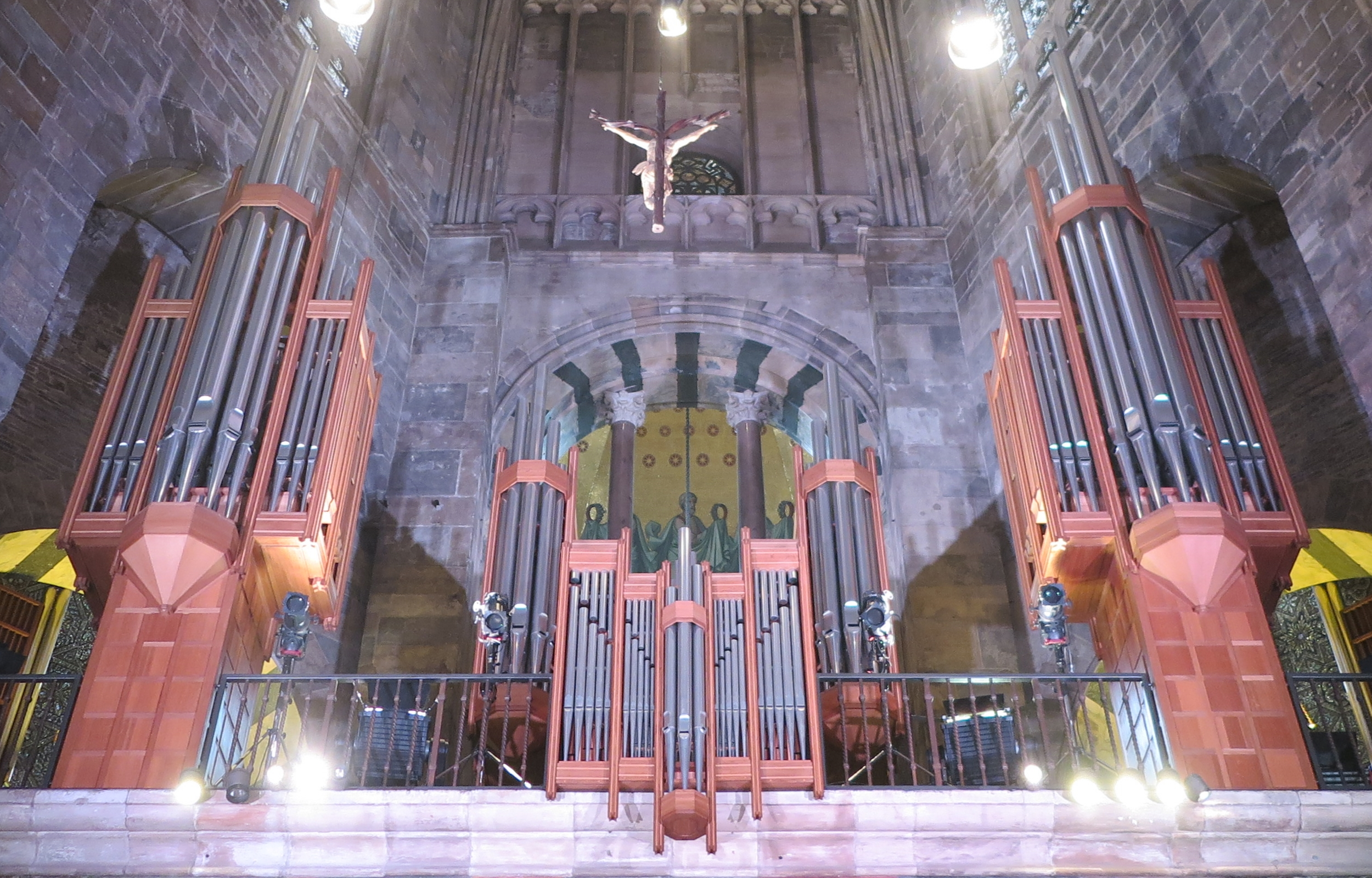 Orgel auf dem Hochmünster in der Chorhalle des Aachener Doms. Die Schwalbennestorgel aus dem Jahr 1939 wurde von Orgelbau Klais zwischen 1991 und 1993 zu einem eigenständigen Instrument mit 30 Registern, verteilt auf vier Werke (drei Manuale und Pedal) ausgebaut und besitzt nun einen eigenen mechanischen Spieltisch mit elektrischen Registertrakturen. Die Hochmünsterorgel ist der Hauptorgel zuschaltbar.